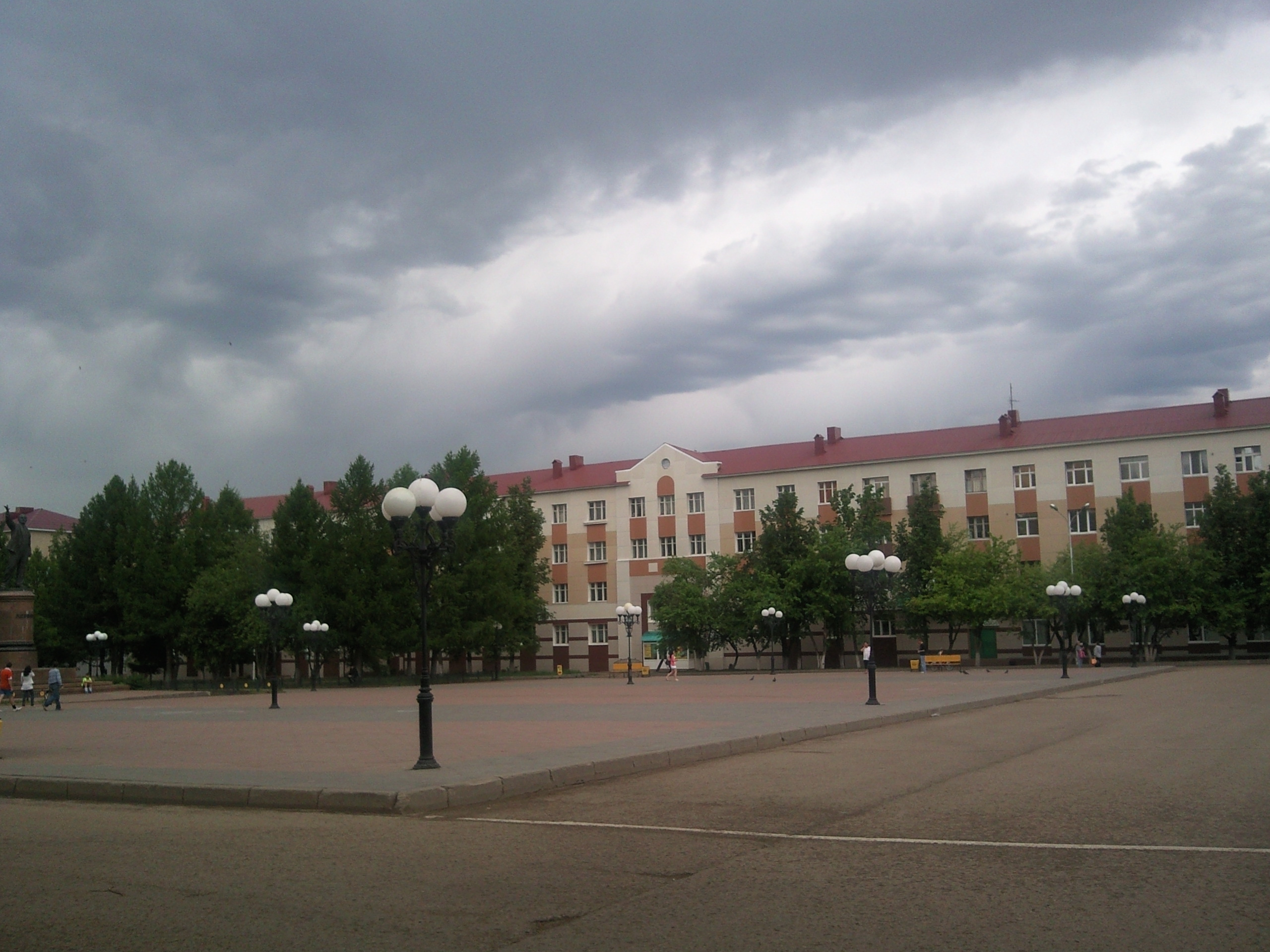 Leninogorsk